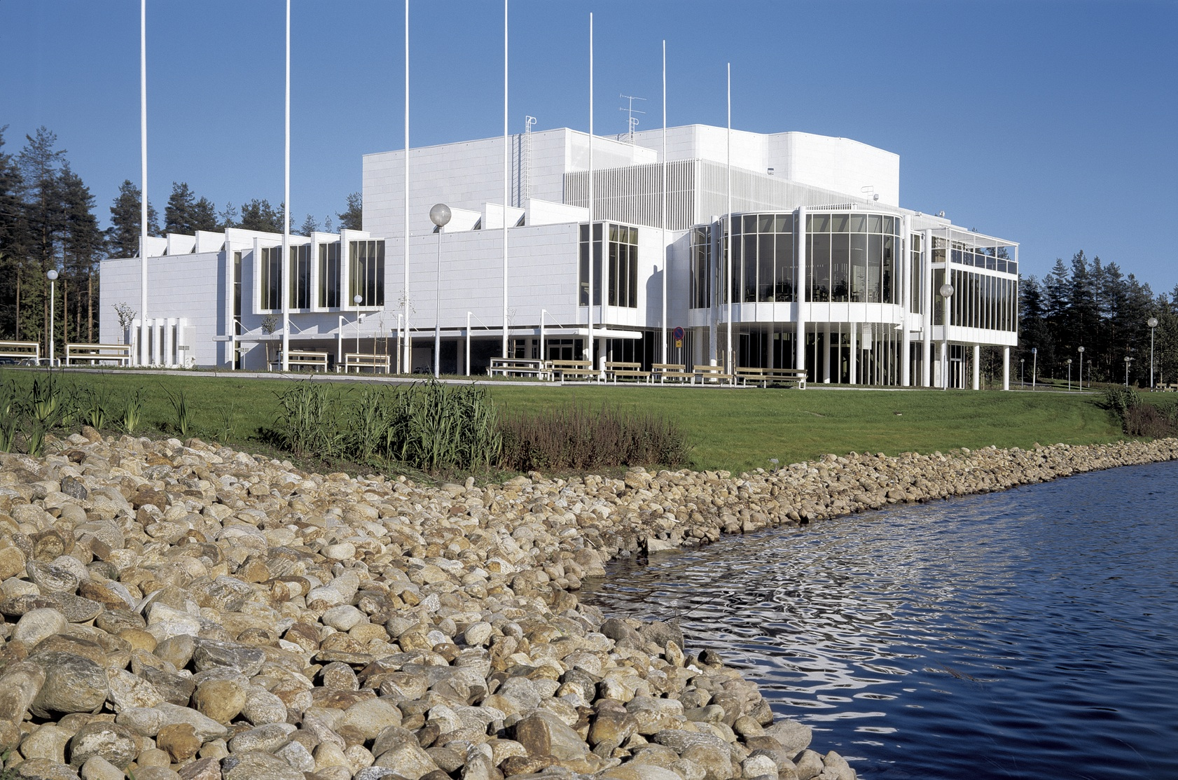 Mikkelin konserttitalo / Arto Sipinen